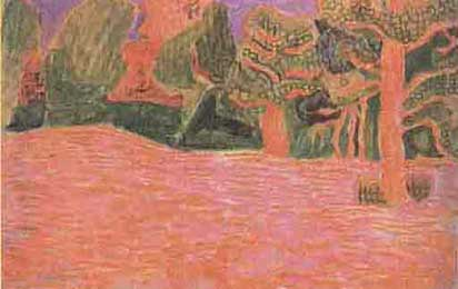 Картина Елены Гуро "Сосны" (1912)